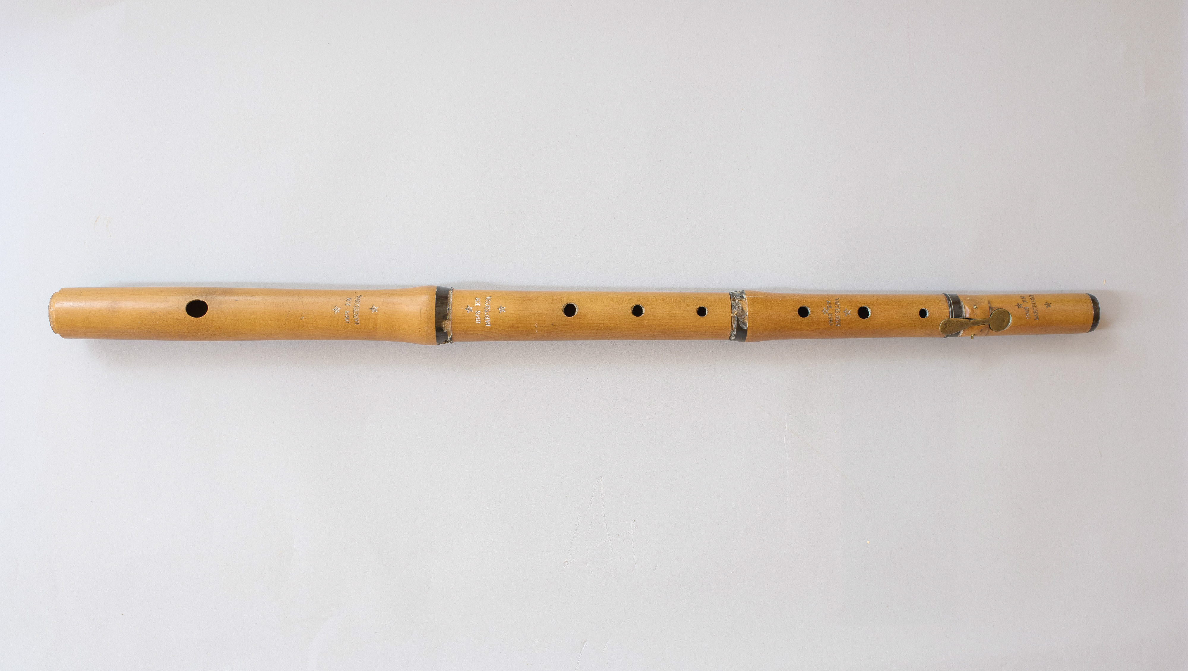 Es tracta d'un instrument construït a Barcelona a finals del segle XVIII, per Oms (Museu de la Música de Barcelona).